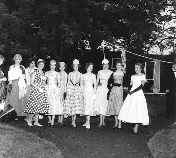 Modeshow bij de Middelbare Kunstnijverheidsschool in Maastricht in 1956. Deze school was de voorloper van de huidige Maastricht Academy of Fine Arts and Design. Fotocollectie RHCL Maastricht, GAM 11964.